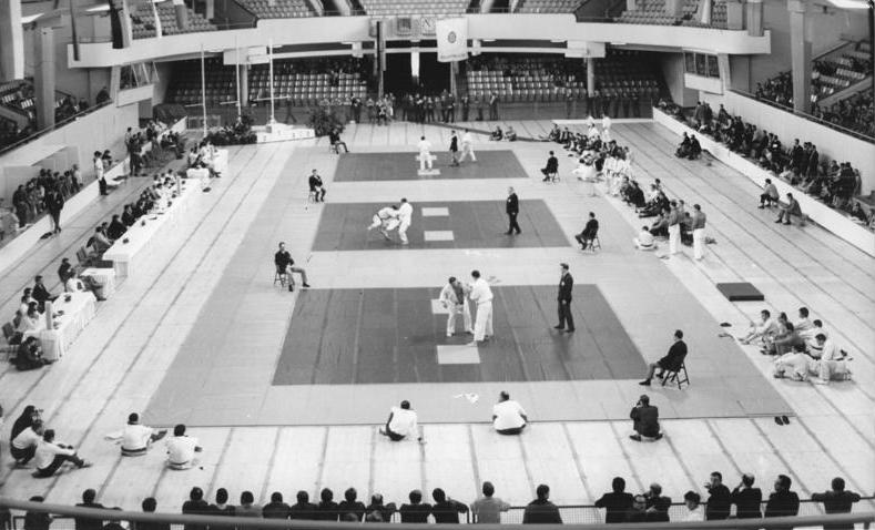 Berlin, Werner-Seelenbinder-Halle, Judo Zentralbild Kutscher 21-5-70 Berlin: XIX. Judo-Europameisterschaften vom 21. bis 24.5.70-Blick in die Werner-Seelenbinder-Halle. Mit der ersten Runde im Mannschaftswettbewerb begannen am Vormittag (21.5.70) die Titelkämpfe, an denen sich Aktive aus 20 Ländern beteiligten.